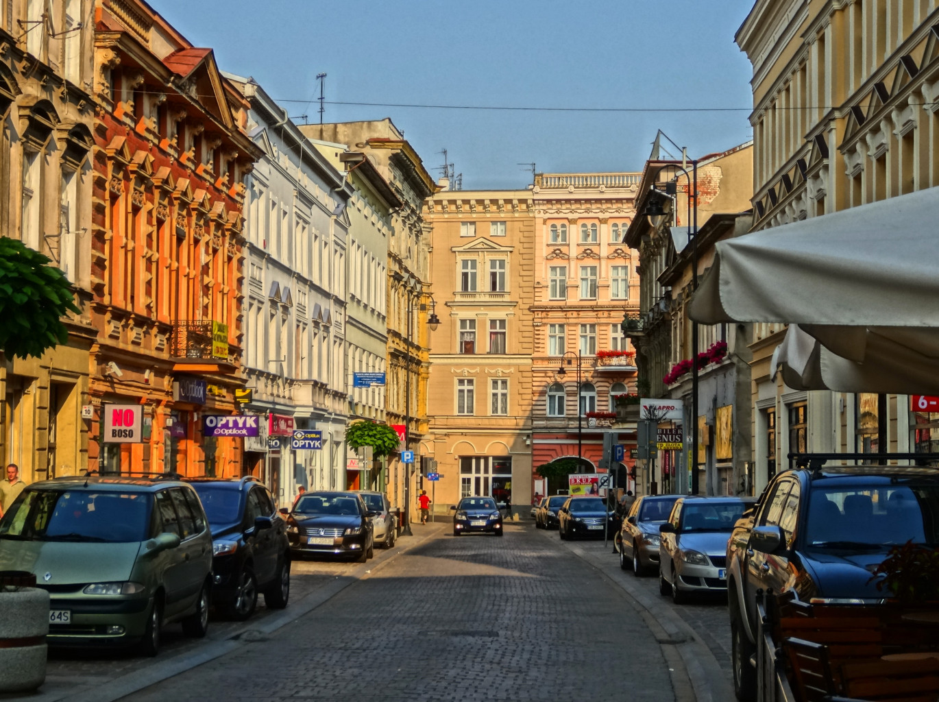 Ulica Dworcowa w Bydgoszczy na odcinku od ul. Gdańskiej do ul. Warmińskiego